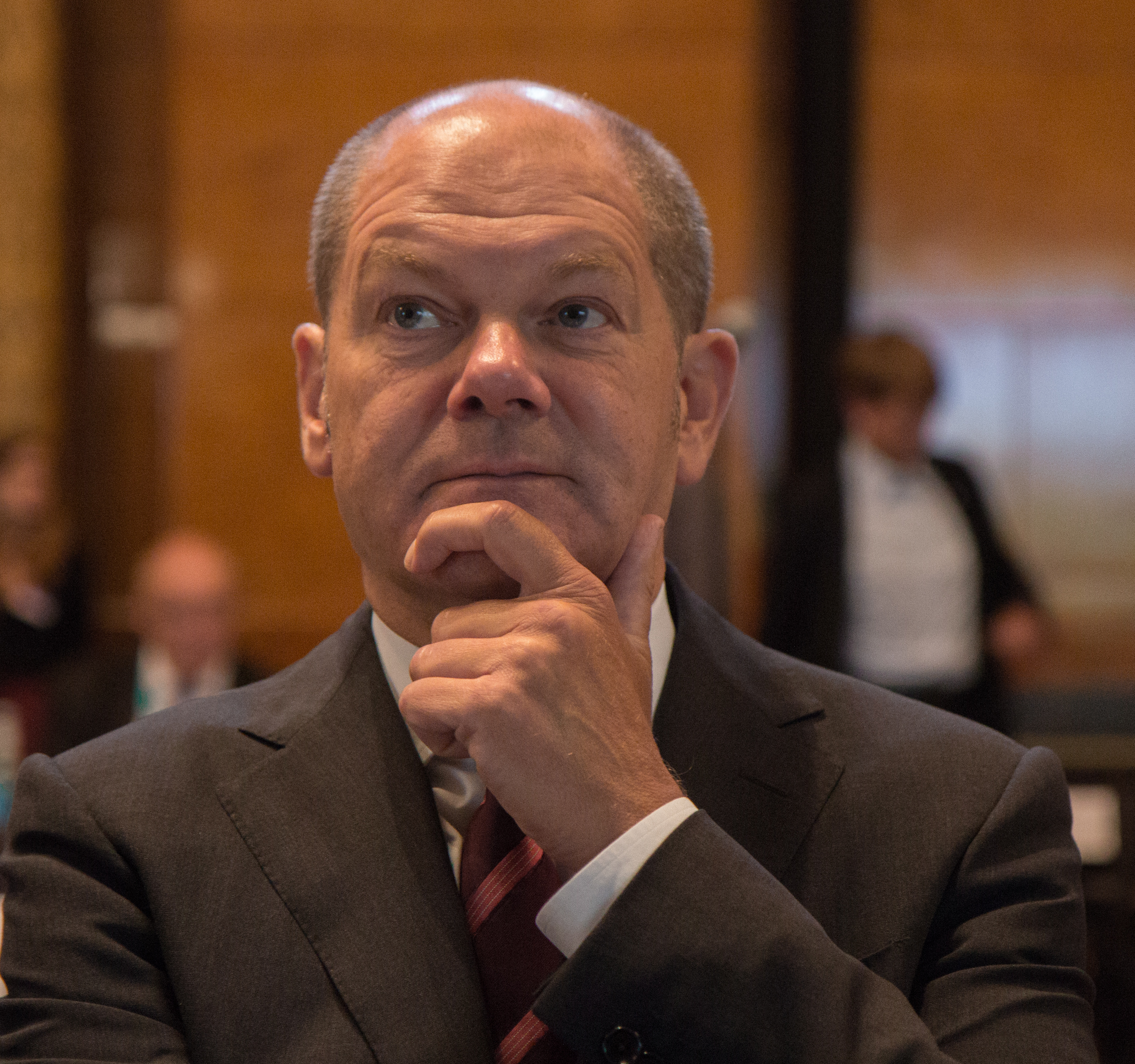 BSPC 26 in Hamburg: 4.9.2017 Opening